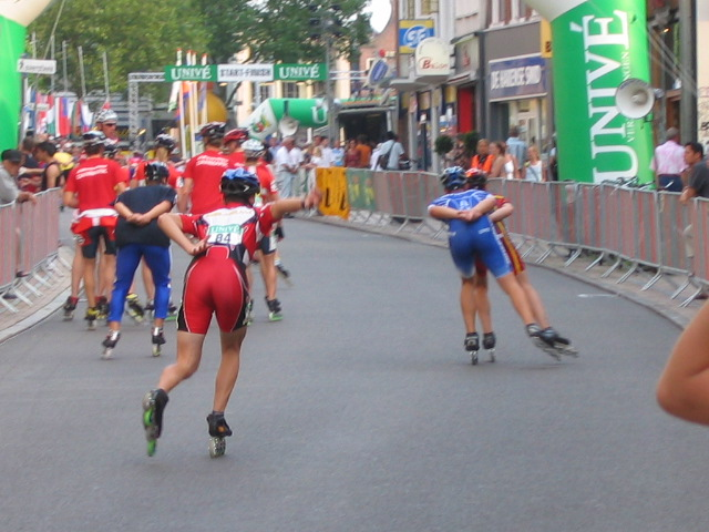 Inrijden tijdens EK Skeeleren 2004 te Groningen